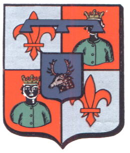 Wapen van Waregem /